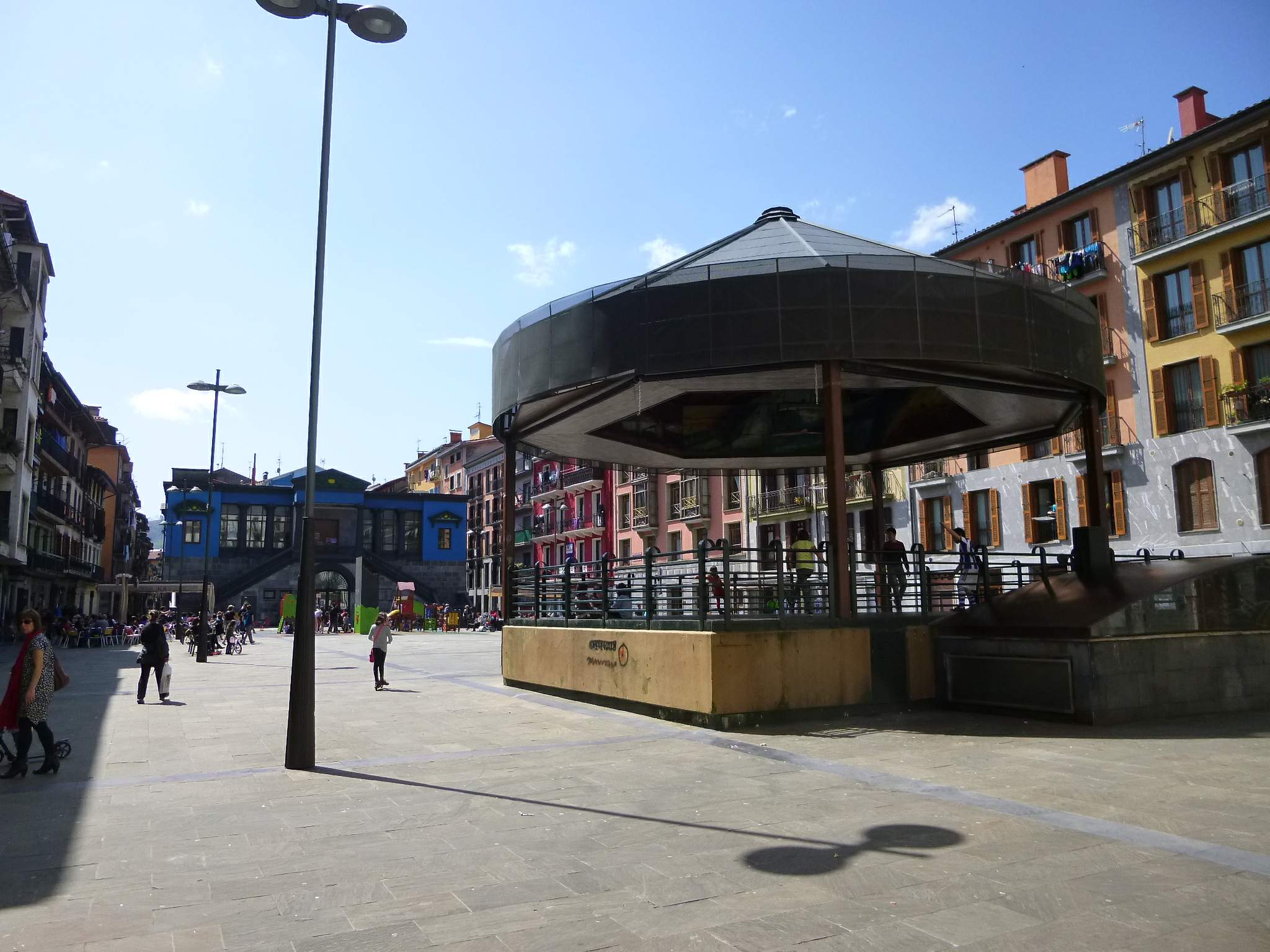 Plaza Berria (Tolosa)